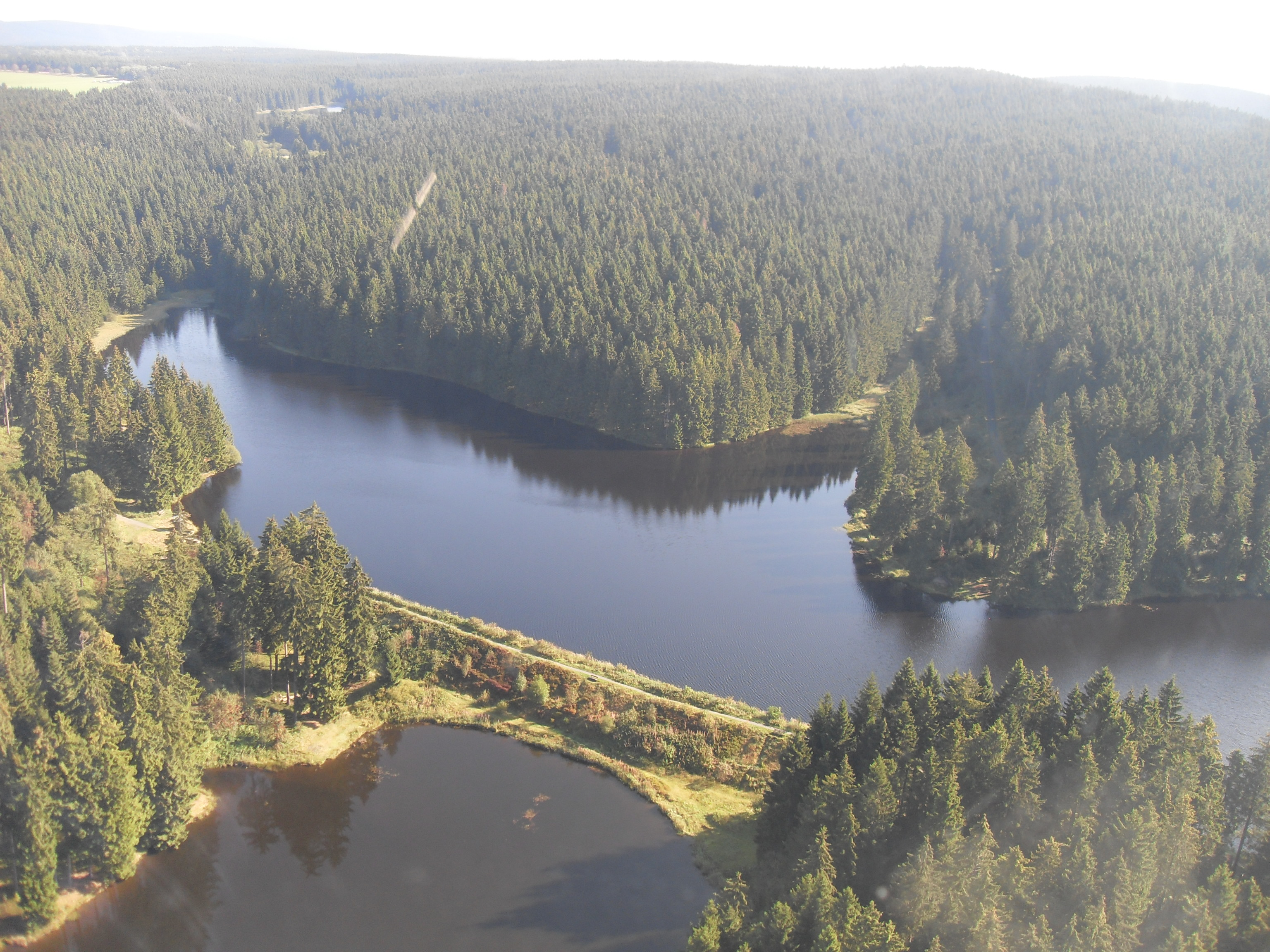 Bärenbrucher Teich: Luftbild von Damm und Wasserfläche. Im Vordergrund links die Wasserfläche des unmittelbar unterhalb angeordneten Ziegenberger Teiches.